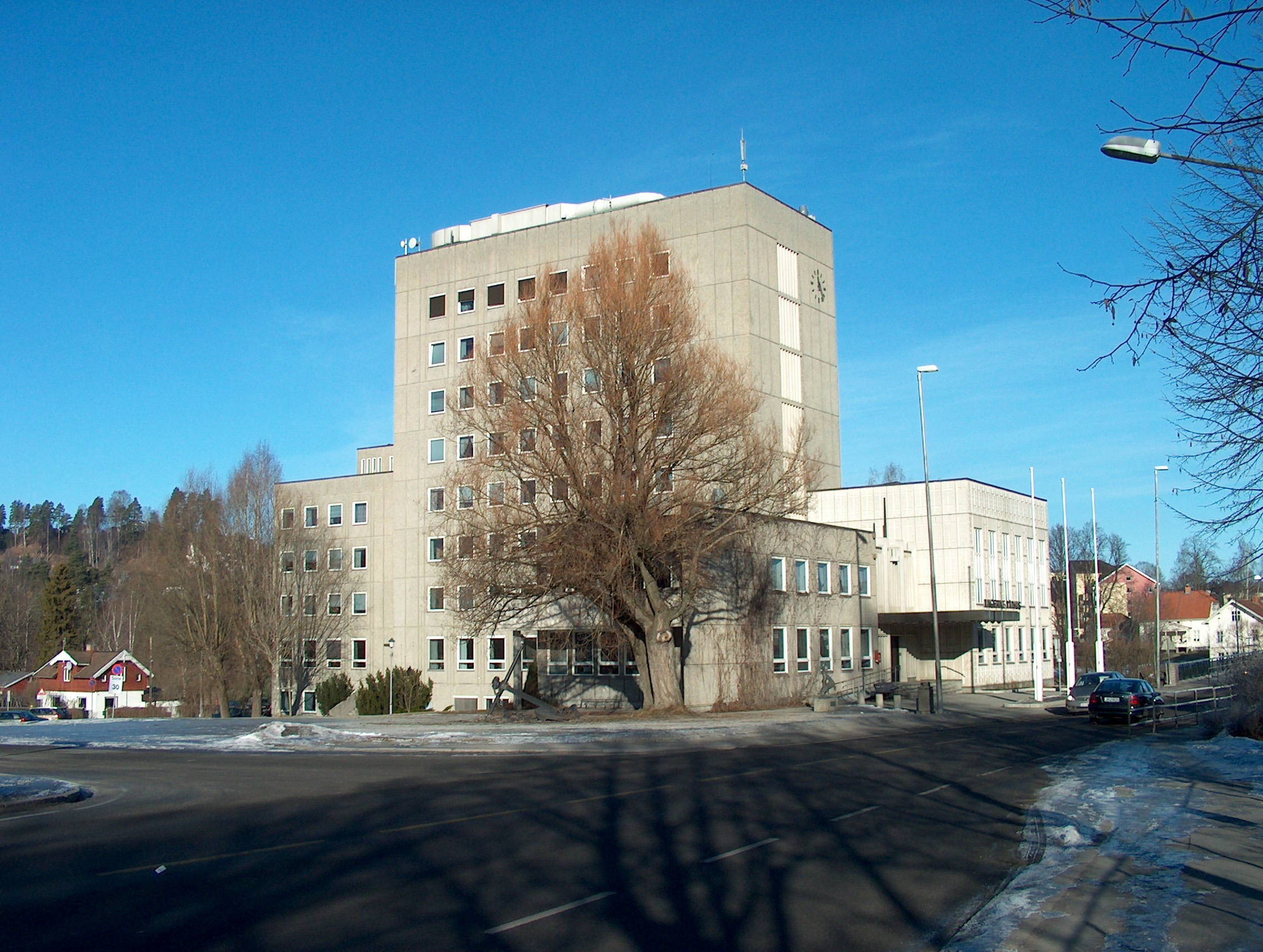 Ringerike rådhus (sørfasade)